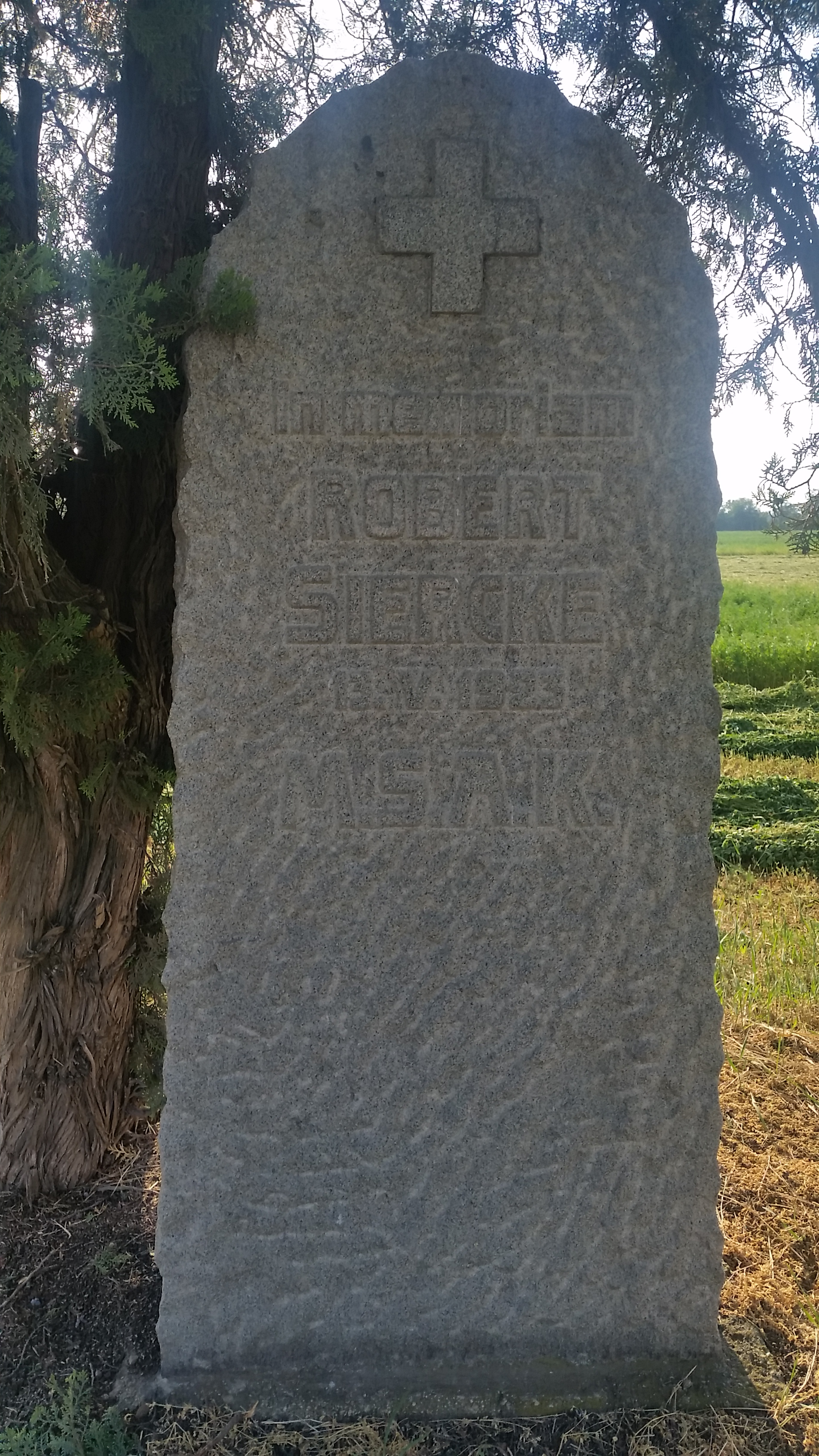 Pomník na místě autohavárie, kde zahynul Robert Siercke (1870-1923).